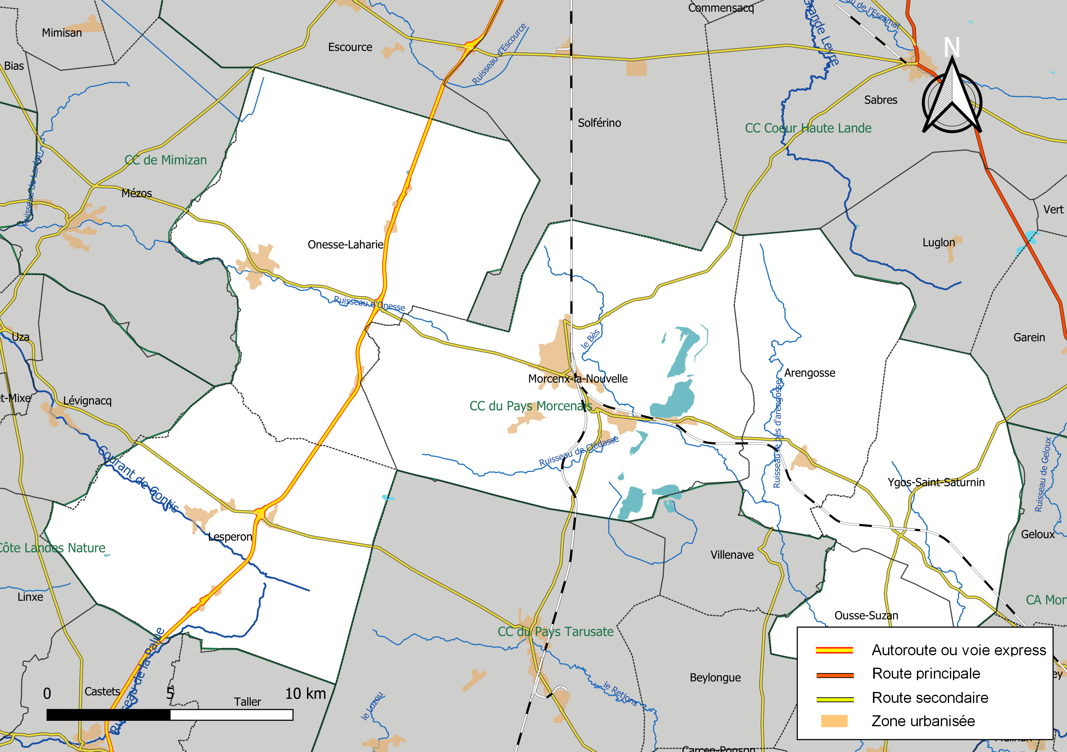 Carte géographique de la Communauté de communes du Pays Morcenais, département des Landes, France. Composition au 1er janvier 2019.